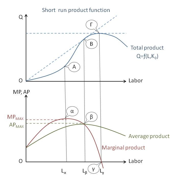 短期生產函數分析圖。